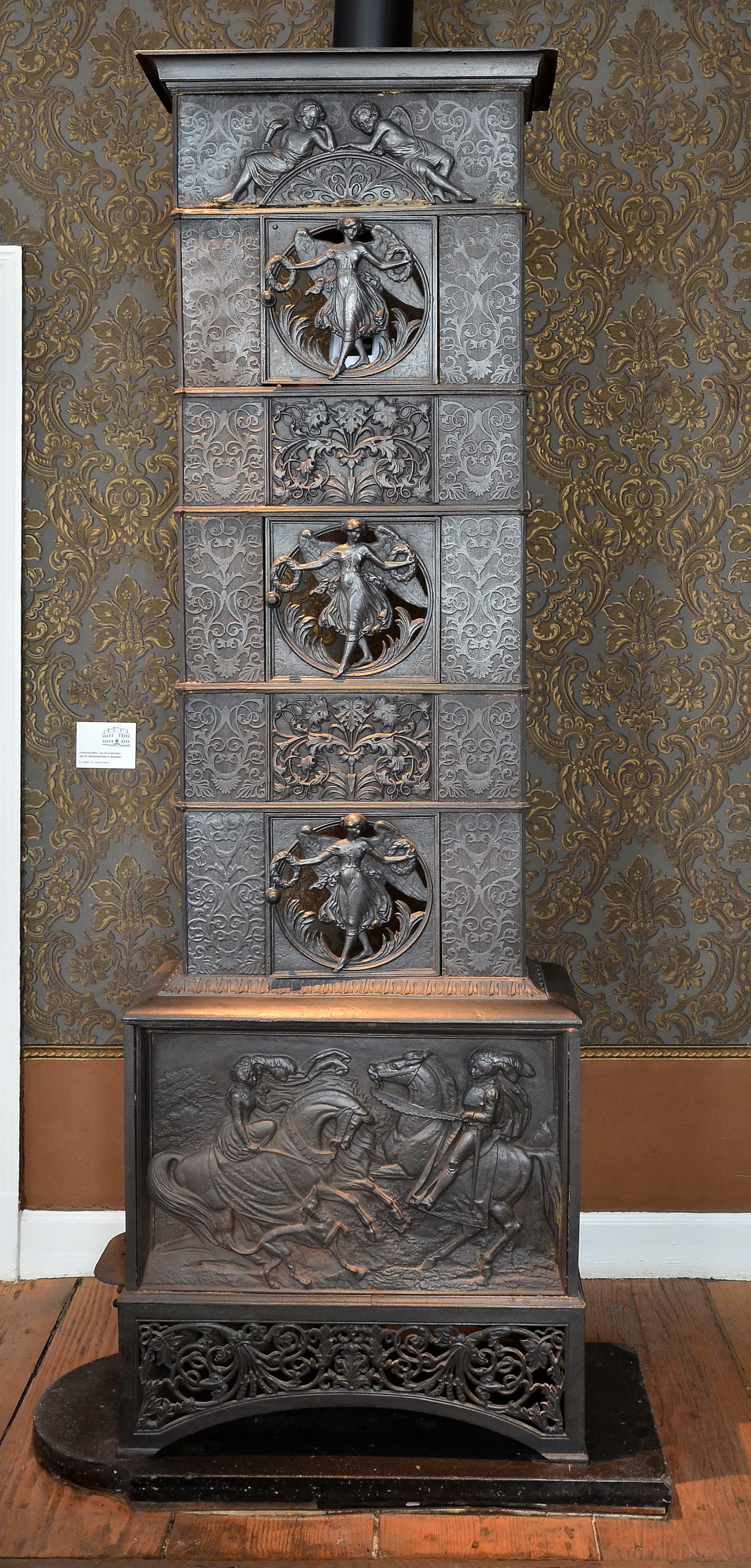 Museum Haus Hövener, Zirkulationsofen 2.Hälfte des 19. Jahrhundert aus der St. Wilhemshütte Warstein